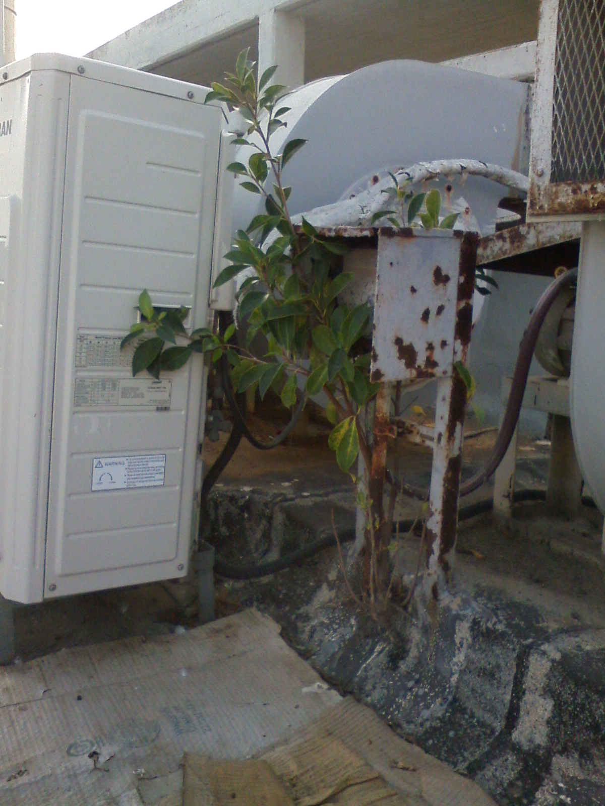 פיקוס השדרות גדל על גג